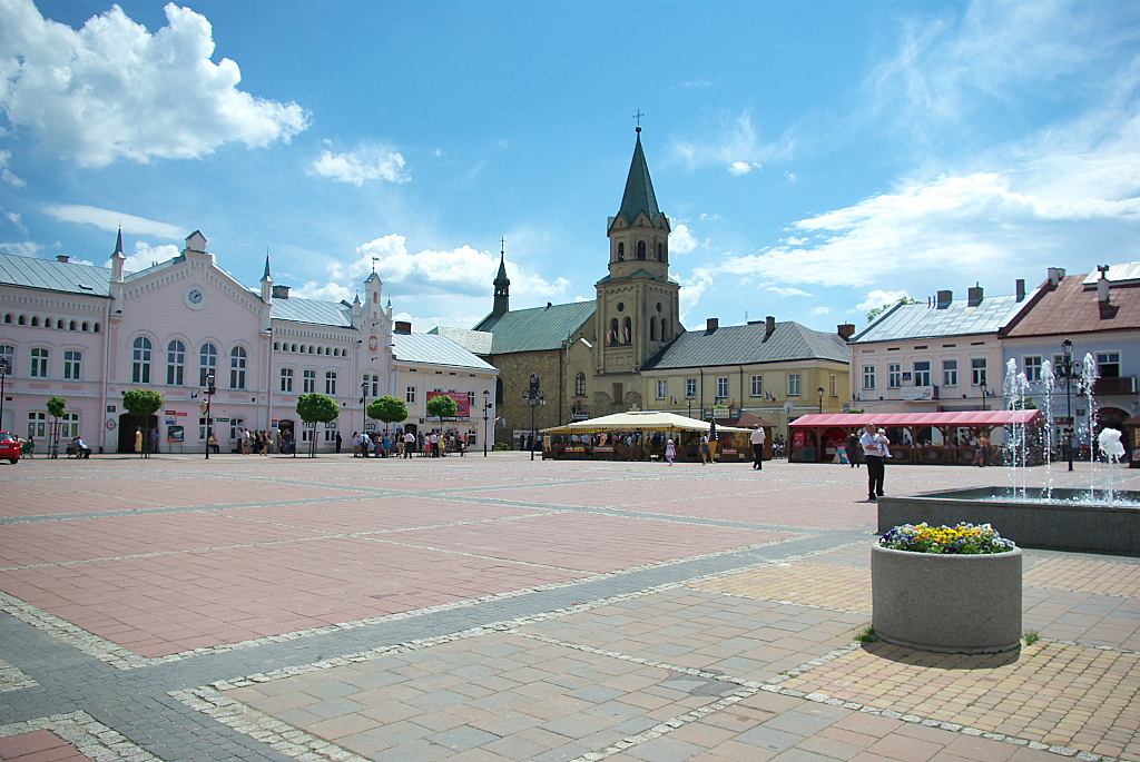 Rynek Sanok maj 2012